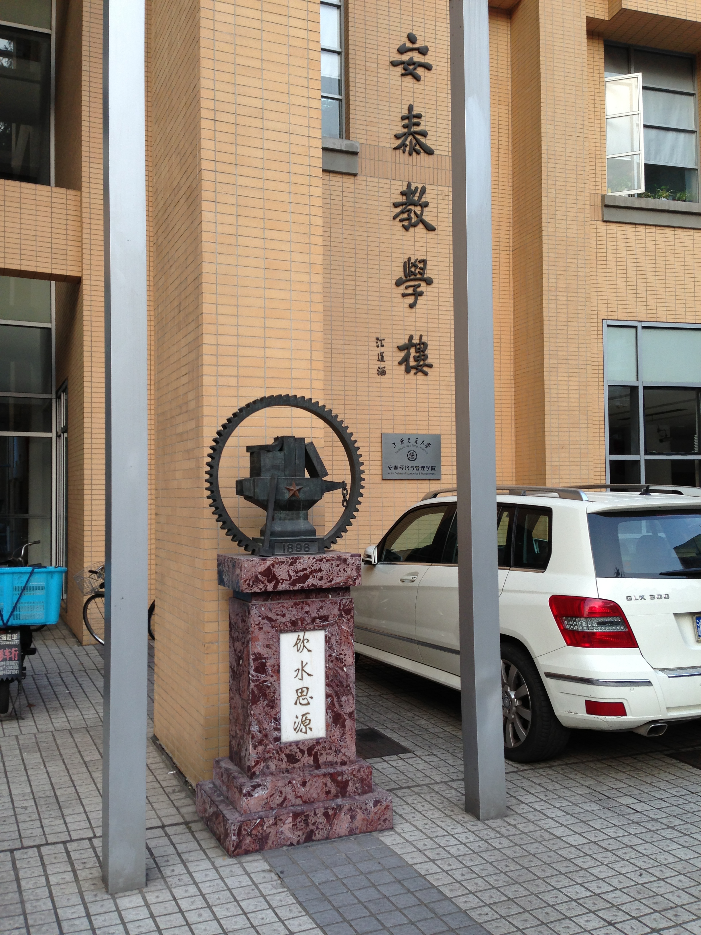 上海交通大学法华校区安泰楼及饮水思源碑